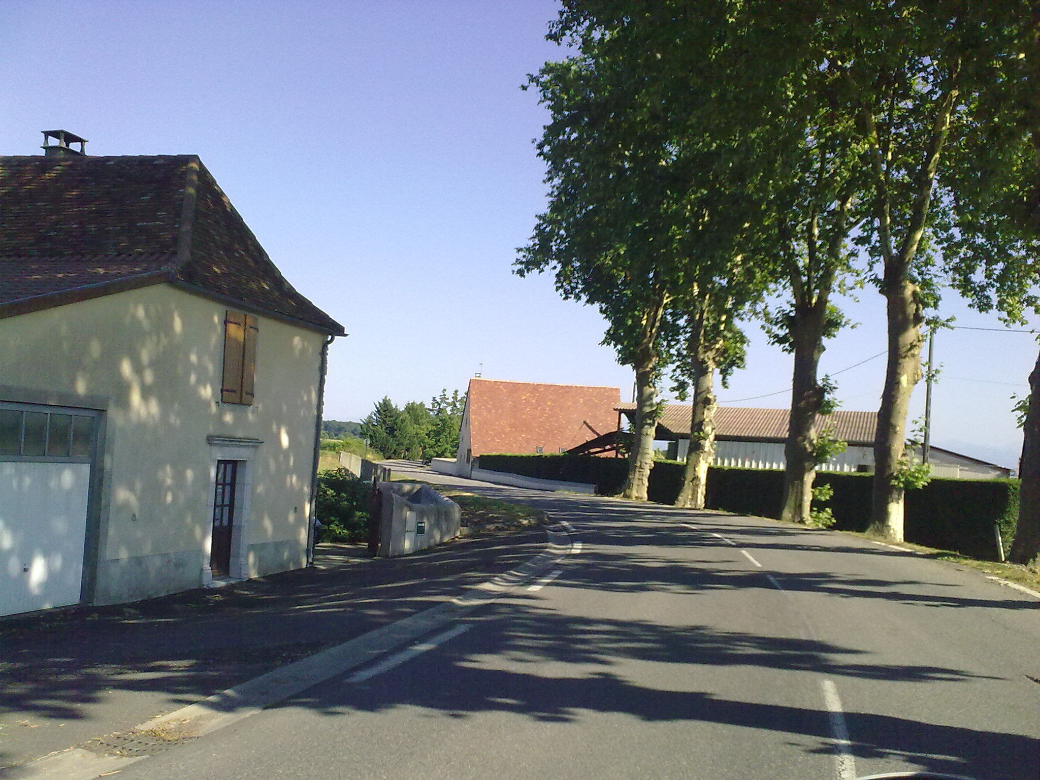 Bugnein le 18 juillet 2010, France.